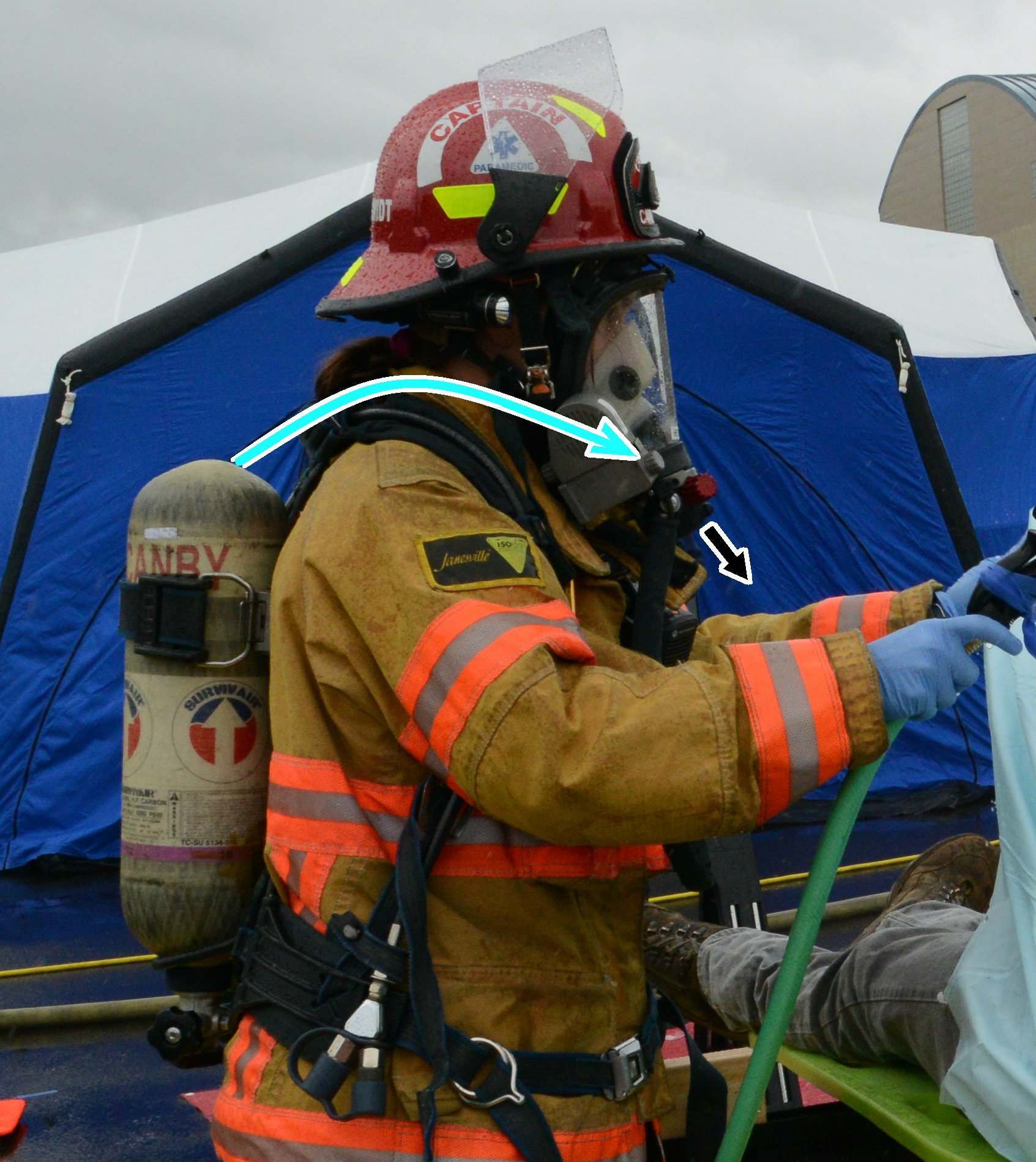 Схема движения воздуха в автономном изолирующем дыхательном аппарате с открытым контуром